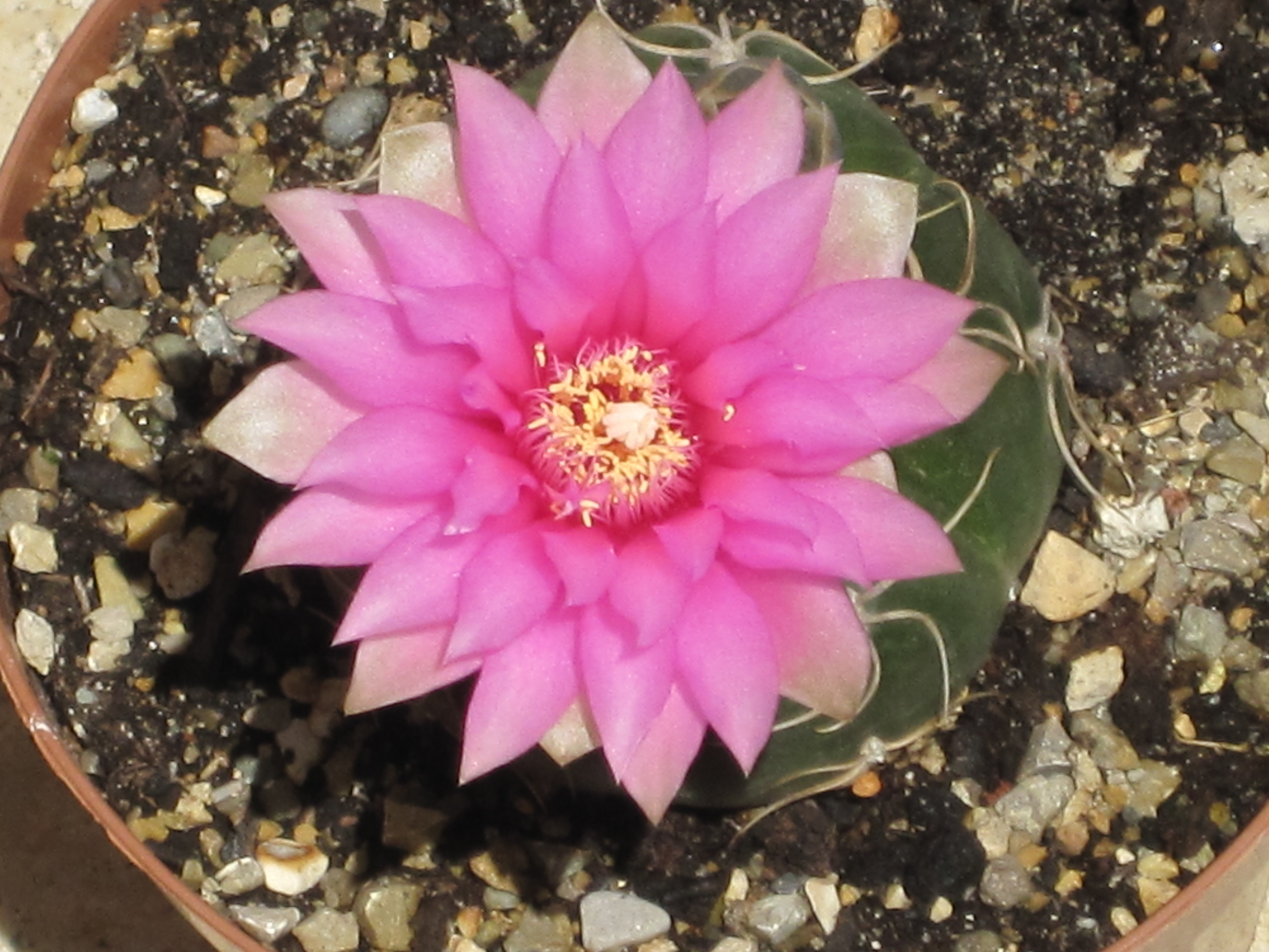 Gymnocalycium denudatum in fiore